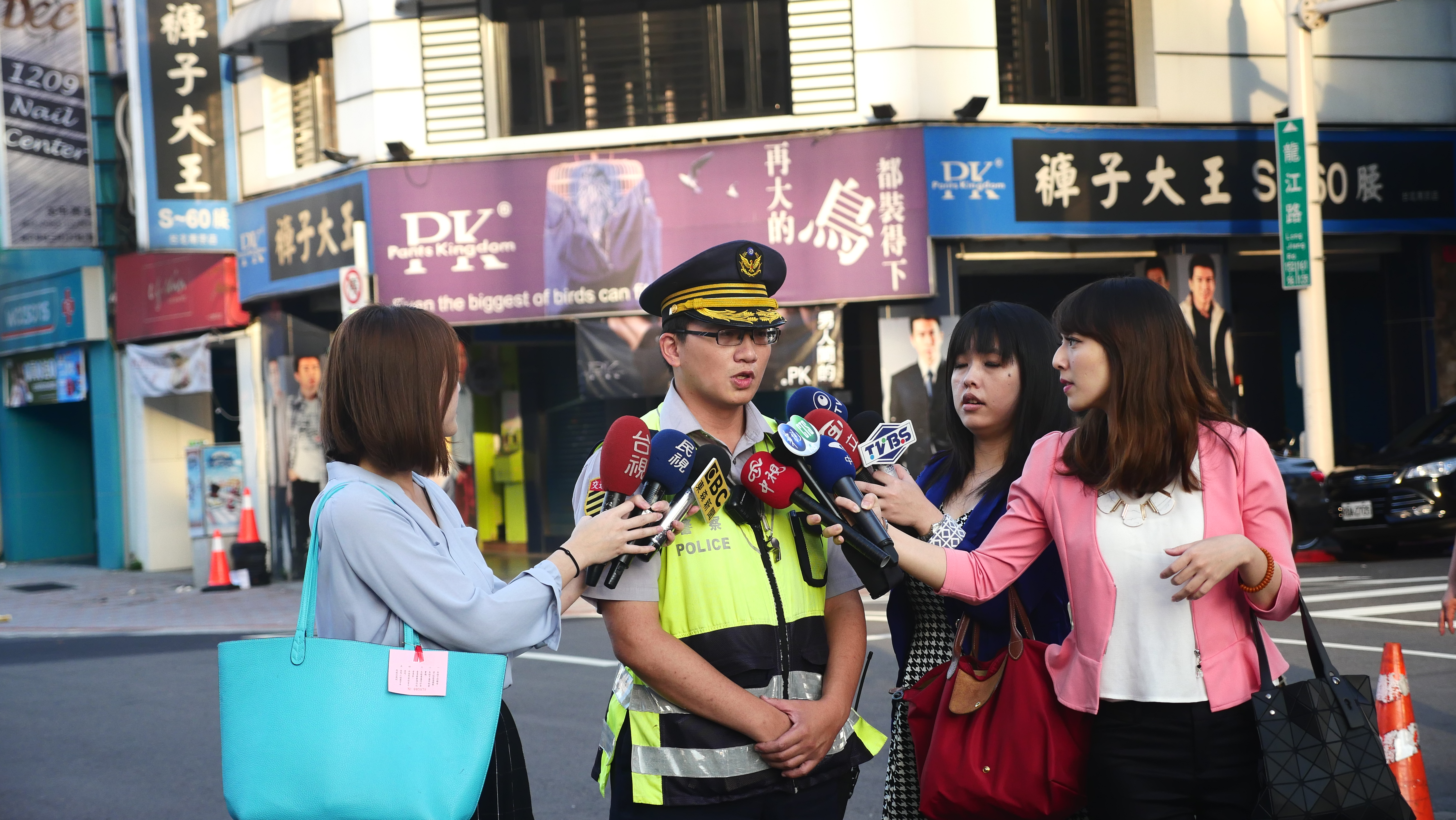 中文（台灣）: 2016年中華航空空服員罷工事件，臺北市政府警察局交通警察接受媒體聯訪。